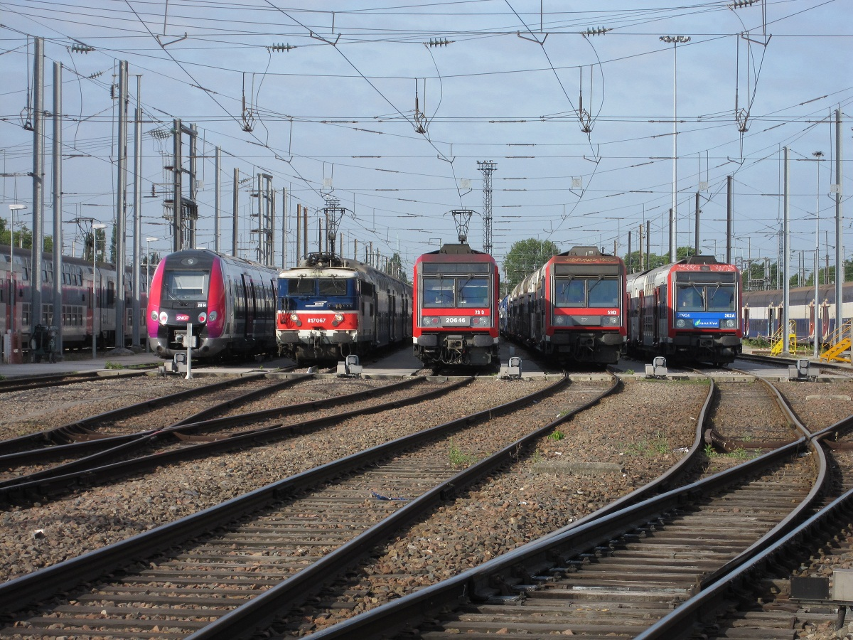 Trains des lignes D et H au Technicentre de Paris Nord-Joncherolles, Villetaneuse, Seine-Saint-Denis, France.